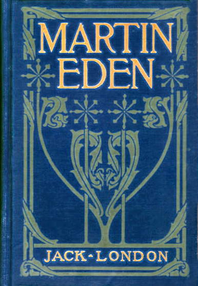 Domaine public. Première édition 1909 du livre de Jack London, décédé en 1916.